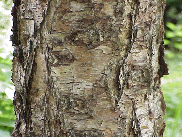 Species: Betula nigra Family: Betulaceae Image No. 2